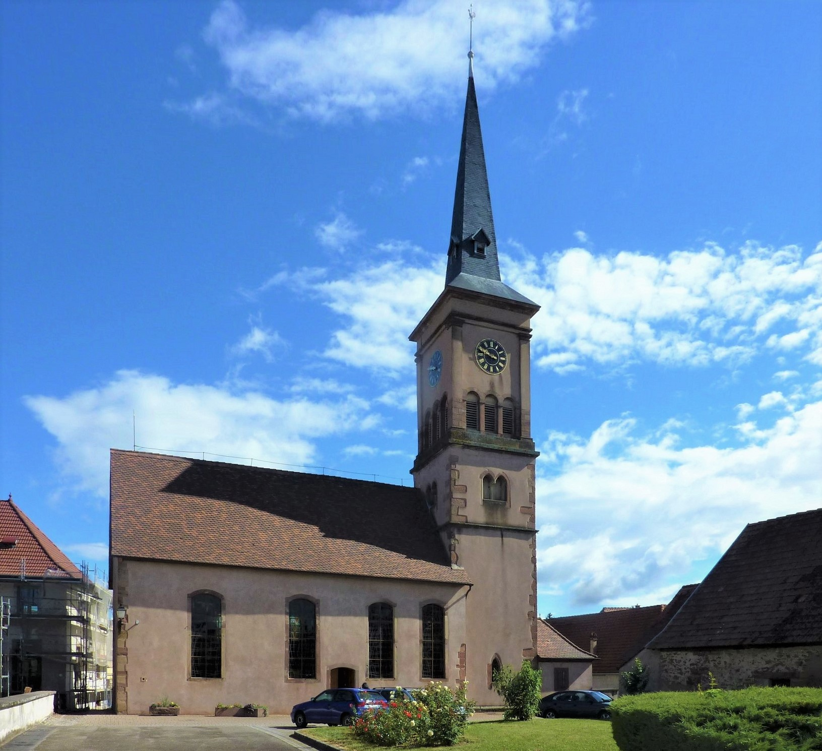 Église Saint-Jean (Goxwiller)